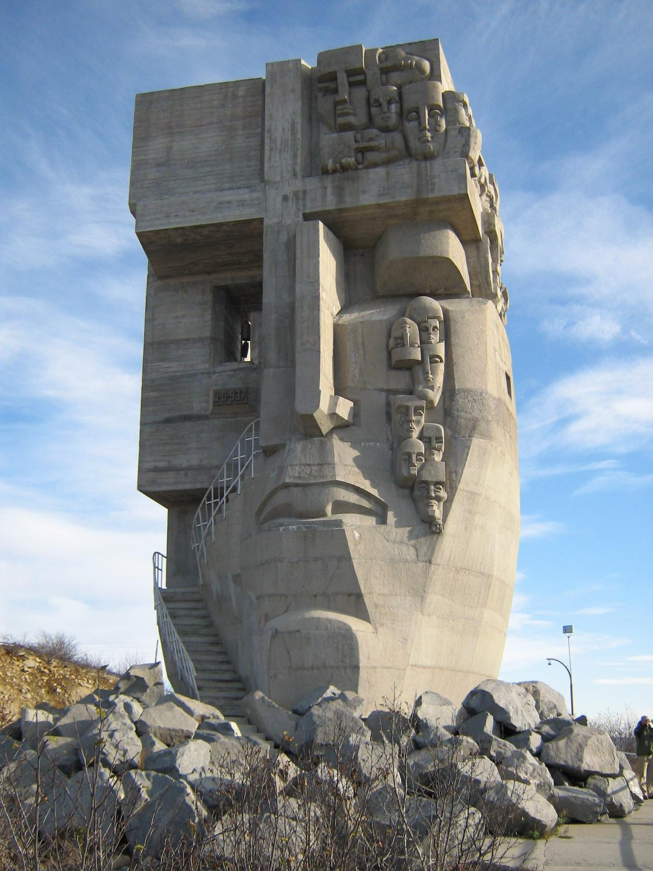 memorial magadan